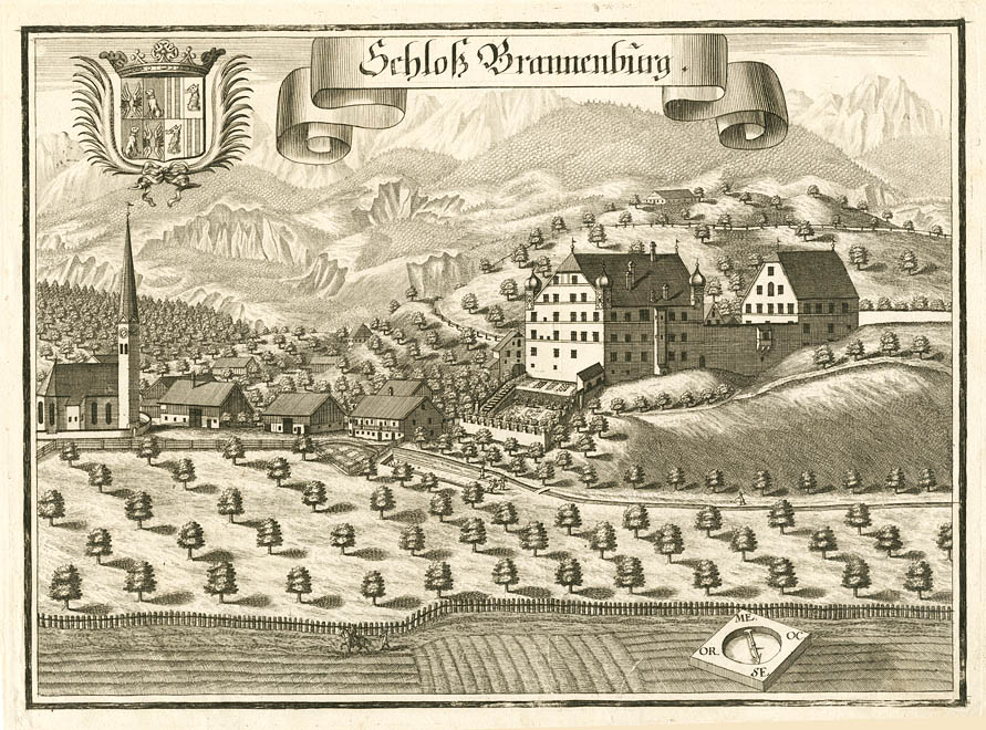 “Schloß Brannenburg.” Aus : Beschreibung des Churfürsten- u. Hertzogthumbs Ober- und Nidern Bayrn. Rentamt München, 1701